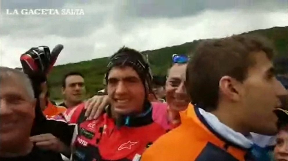 Dakar 2018. Llegada a Salta de los hermanos Kevin y Luciano Benavídes. Registro de La Gaceta de Salta. En la foto, Luciano Benavídes es entrevistado y detrás Kevin es saludado.